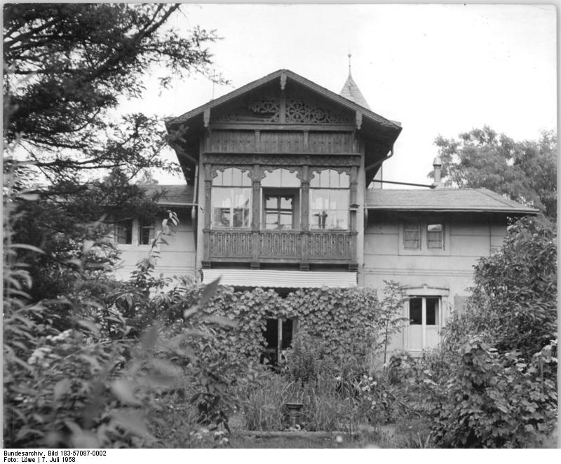 Dresden, Nordstraße Zentralbild Löwe 7.7.1958 Vgt-Noa. Kraszewski-Gedenktafel in Dresden enthüllt. Eine Gedenktafel für den polnischen Schriftsteller Jozef Ignacy Kraszewski wurde am 24.7.1958 in der Nordstrasse 28 in Dresden-Neustadt enthüllt, wo der „Vater des polnischen Romans“ mehrere schaffensreiche Jahre hindurch wohnte. UBz: Das Haus an der Nordstrasse 28.